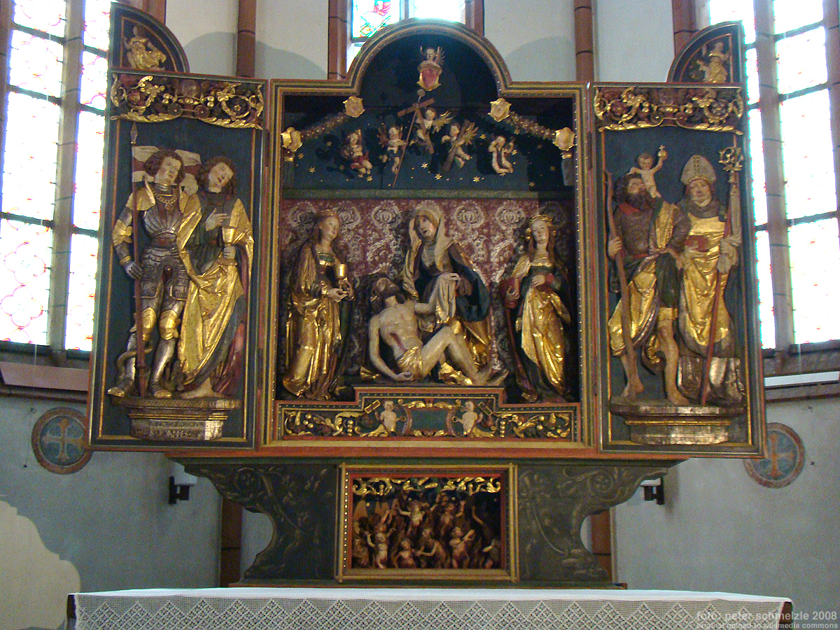 Hochaltar in der Stadtkirche Bad Wimpfen